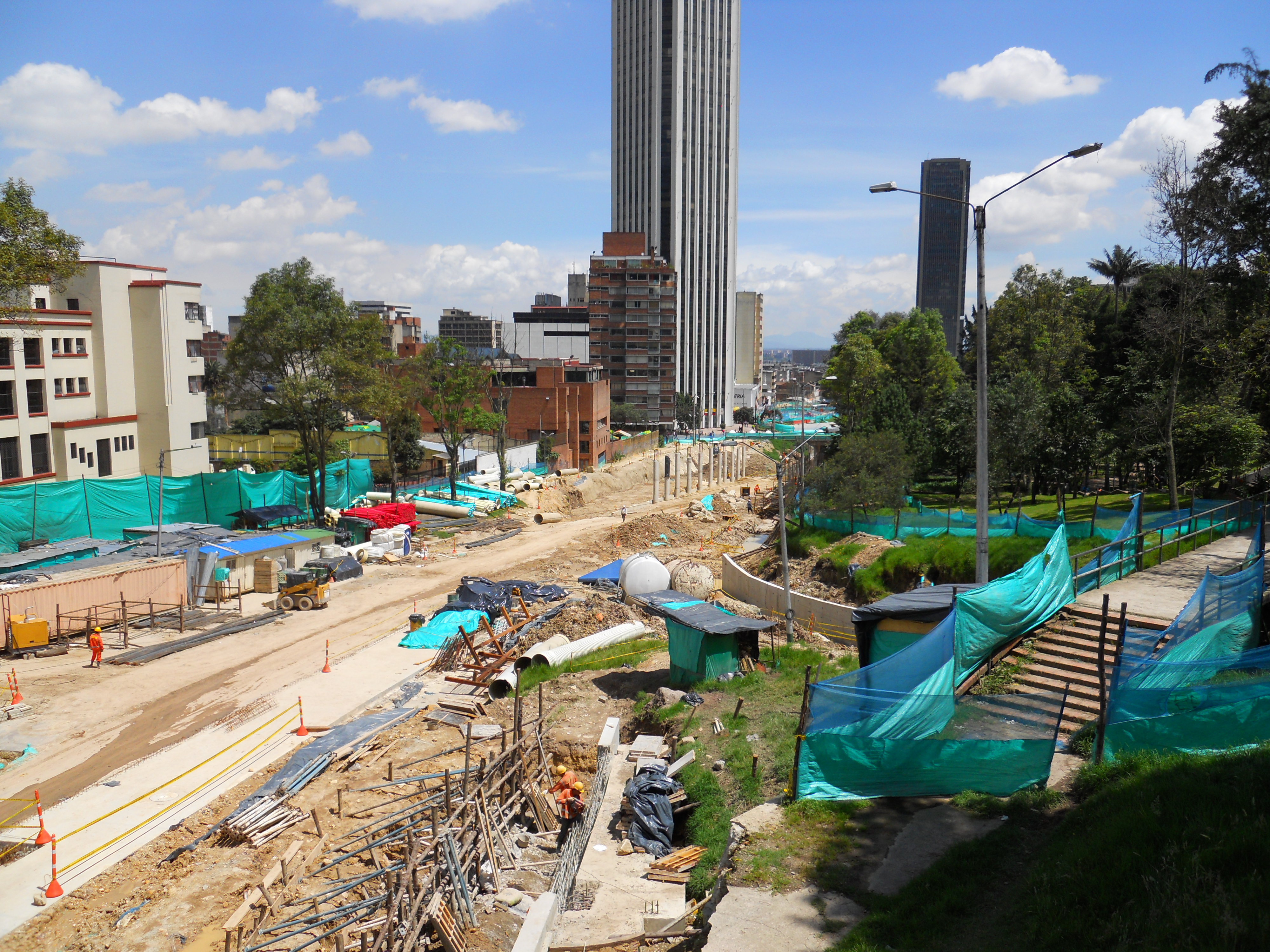 Obra de Transmilenio Avenida 26 con kr 5.